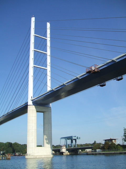 Stralsund, Germany, Rügenbrücke